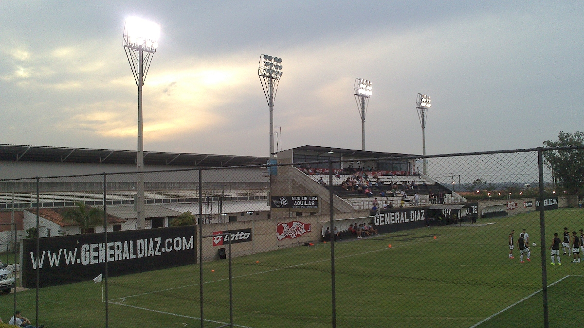 Preferencias del estadio Adrián Jara del Club General Díaz de Luque, Paraguay.